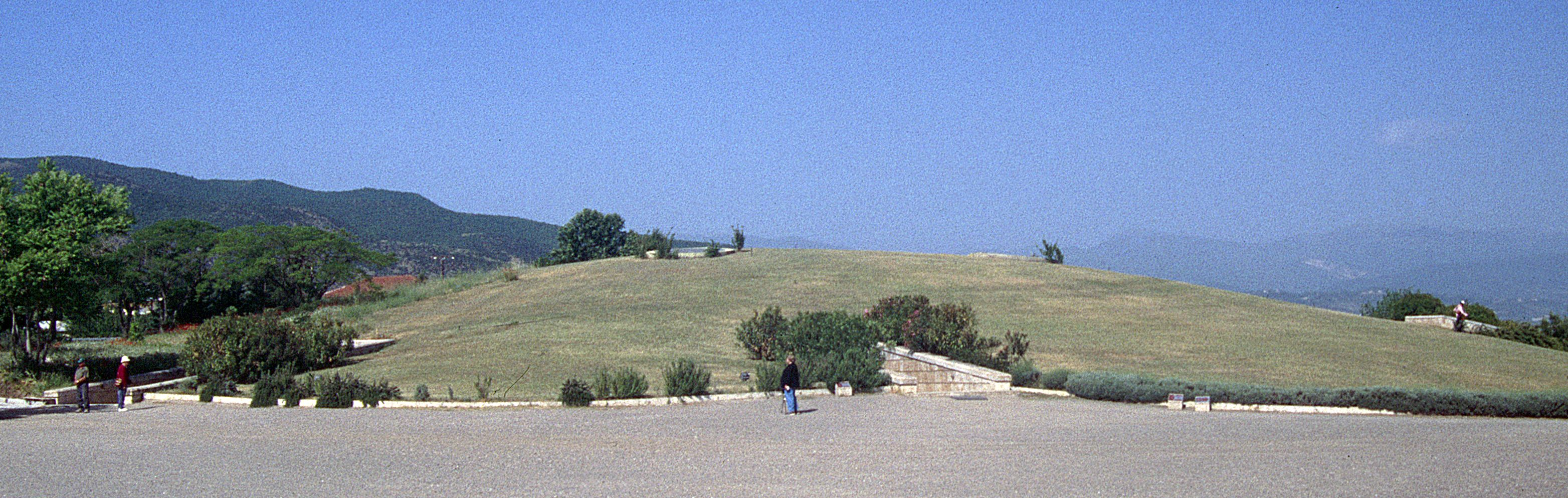 Vergina: Tumulus von Philipps Grab